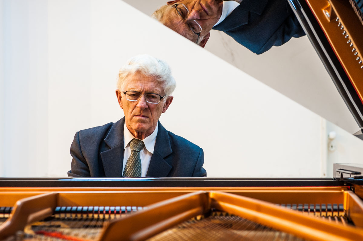 Profesor Andrzej Jasiński przy fortepianie